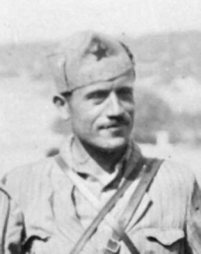 Pero Ćetković nel 1942, ritaglio da File:Štab Prve dalmatinske brigade u vreme njenog formiranja.jpg.